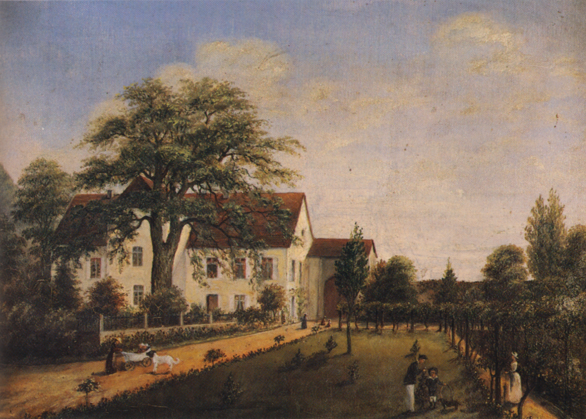 Freiadliges Gut in Handschuhsheim um 1870. Gemälde von Maximilian Graf von Helmstatt (1810–1893)